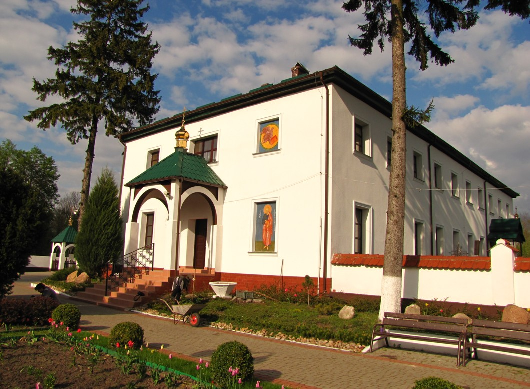 Zespół klasztoru prawosławnego Jabłeczna